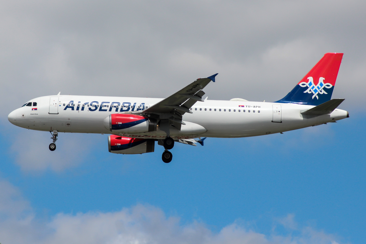 YU-APH A320 Air Serbia